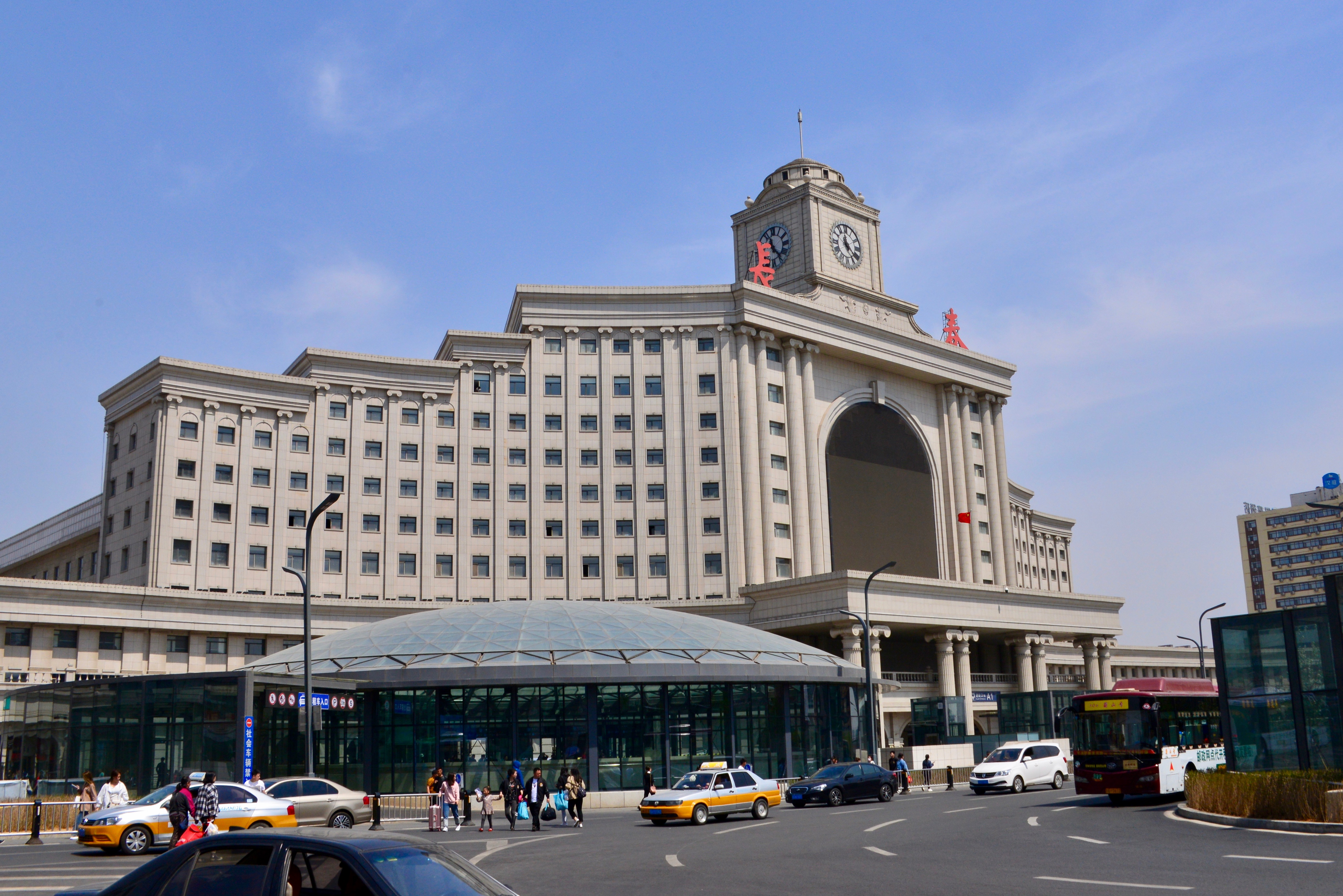 中文（中国大陆）: 长春站 2019